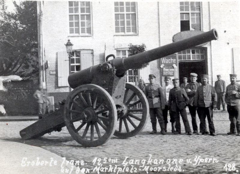 französische "Canon de 120 long de Bange", Hinterlader auf Bocklafette, Kaliber 120mm, Rohr 3,25m (27,1 Kaliber) lang mit Schraubverschluß System de Bange, 1878 (Beschriftung "12,5cm" beruht auf Irrtum oder Aufweitung des Rohrs durch zu intensiven Gebrauch oder überstarke Munition) Die Beschriftung "12,5 cm" beruht auf der Tatsache, daß die Deutsche Kaliberbezeichnung einheitlich auf dem Maße "zwischen den Feldern", also "in den Zügen" eines gezogenen Waffenrohres gemessen wurde. Die Franzosen maßen den Geschoßdurchmesser am "bourellet", also dem gößten Durchmesser des vorderen Geschoßzentrierwulstes. Dieser liegt aber immer zwischen den Feldern und ist damit zwangsweise kleiner. Quelle: Gerhard Linnenkohl, "Vom Einzelschuß zur Feuerwalze" Bernhard und Graefe, Bonn